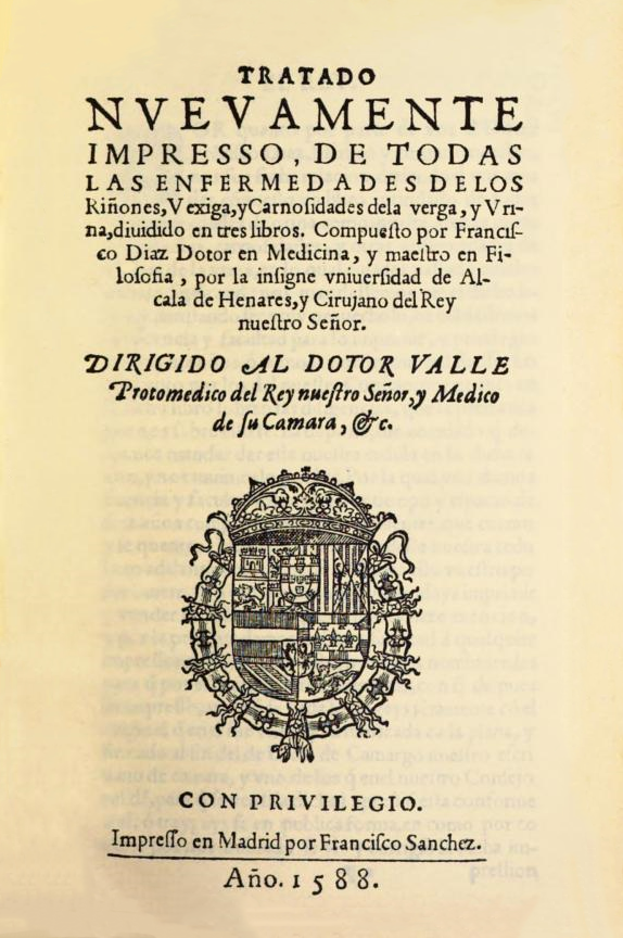 Portada del libro "Tratado nuevamente impresso de todas las enfermedades de los riñones, vexiga, y las carnosidades de la verga y urina". Publicado por Francisco Díaz en Madrid, en 1588.